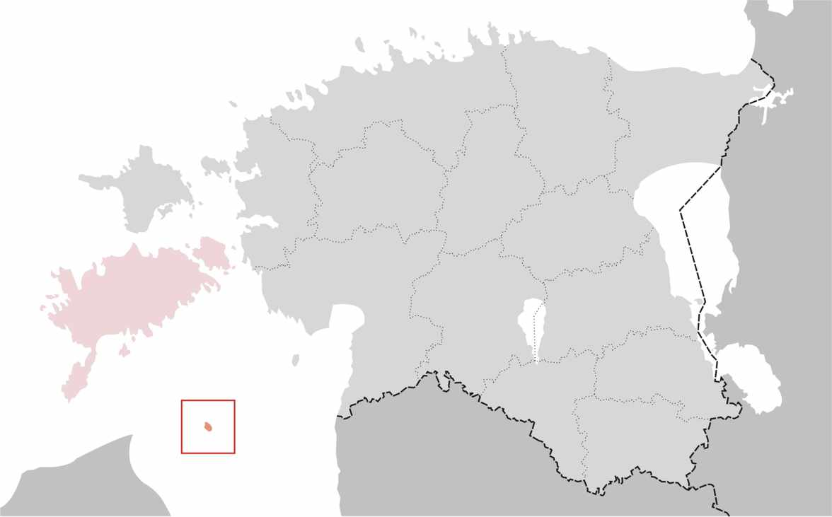 Quelle: selbst erstellt Lage der estnischen Insel Ruhnu (Runö) Verfasser: varp